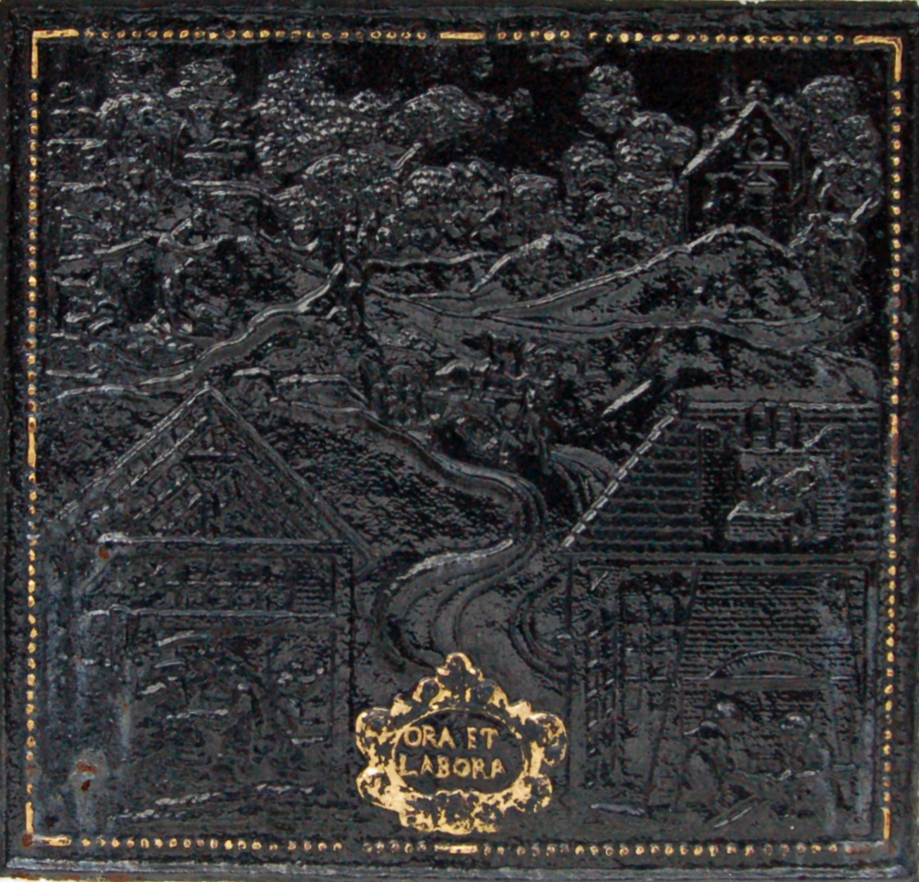 Relief an einem Wohnhaus in Uetersen